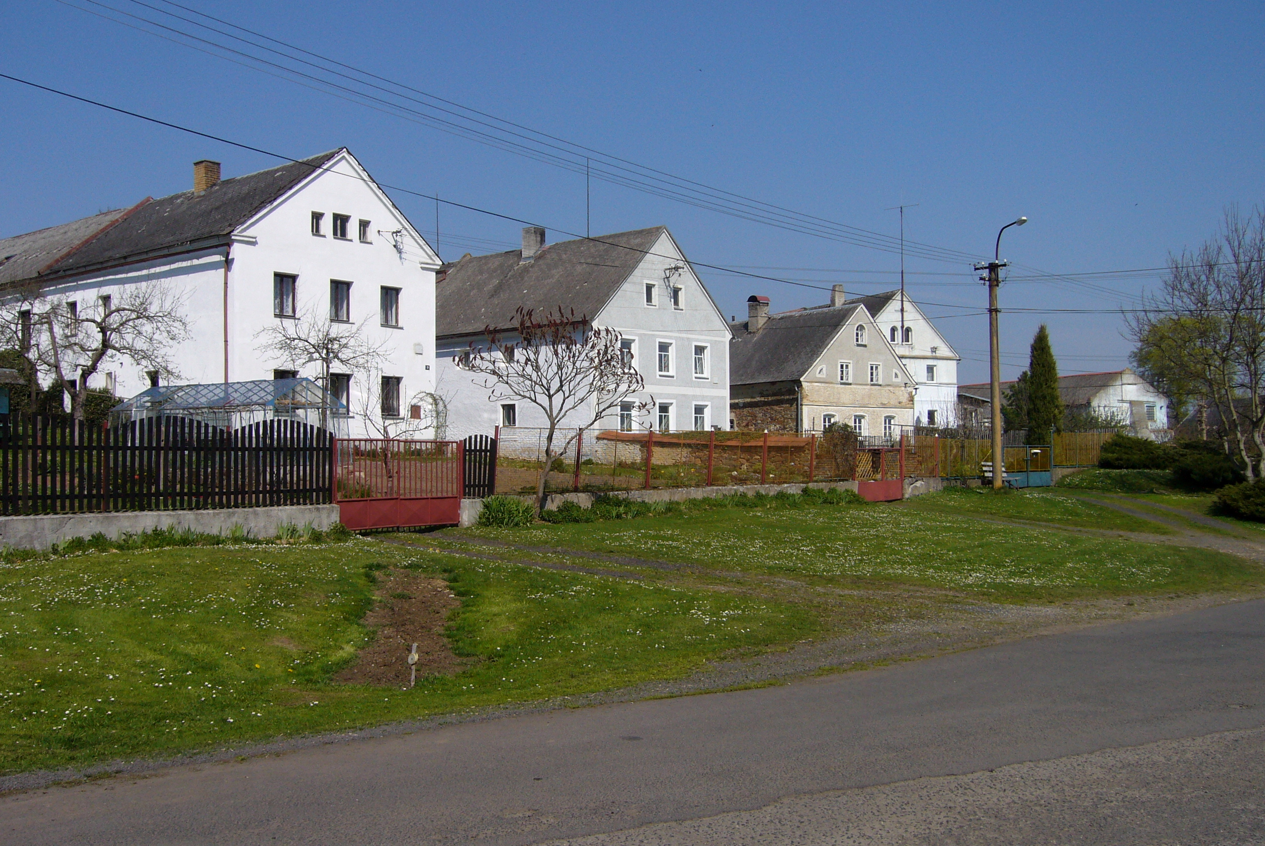 Chylice - domy na severní straně návsi